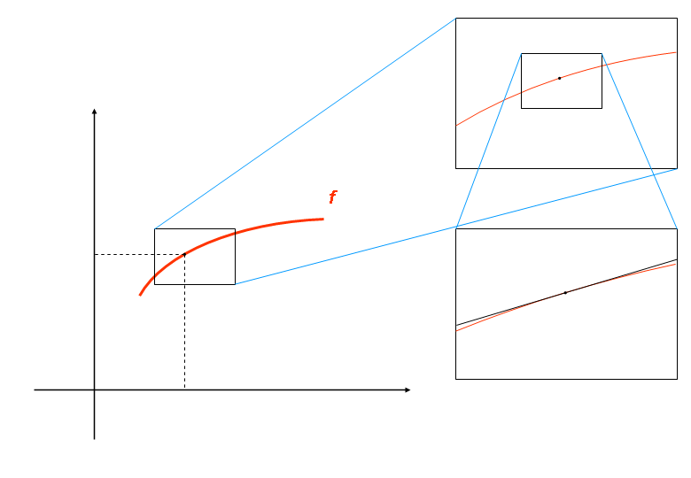 Illusztráció a differenciálhatóság cikkhez